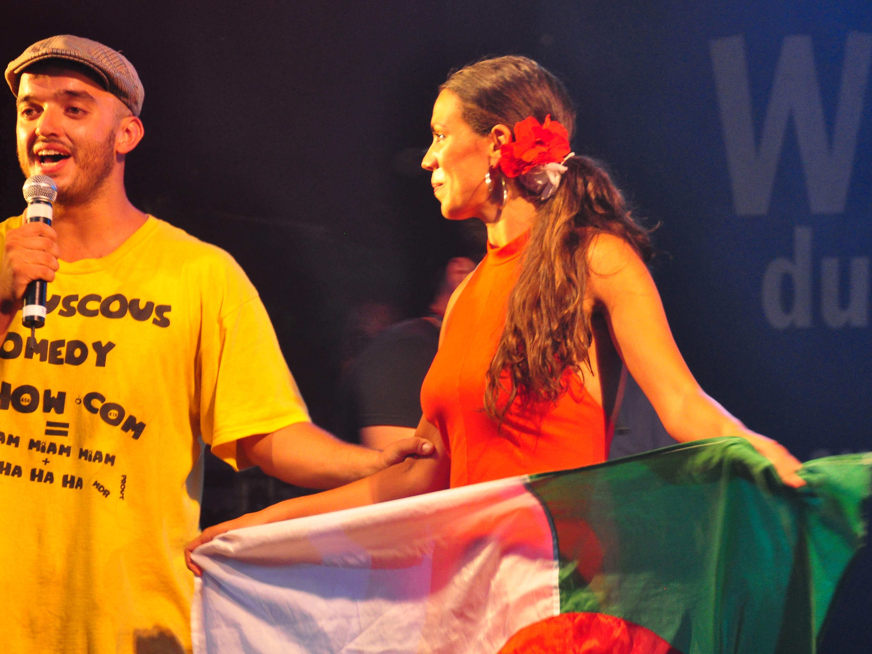 Fête Québec Canada Algérie